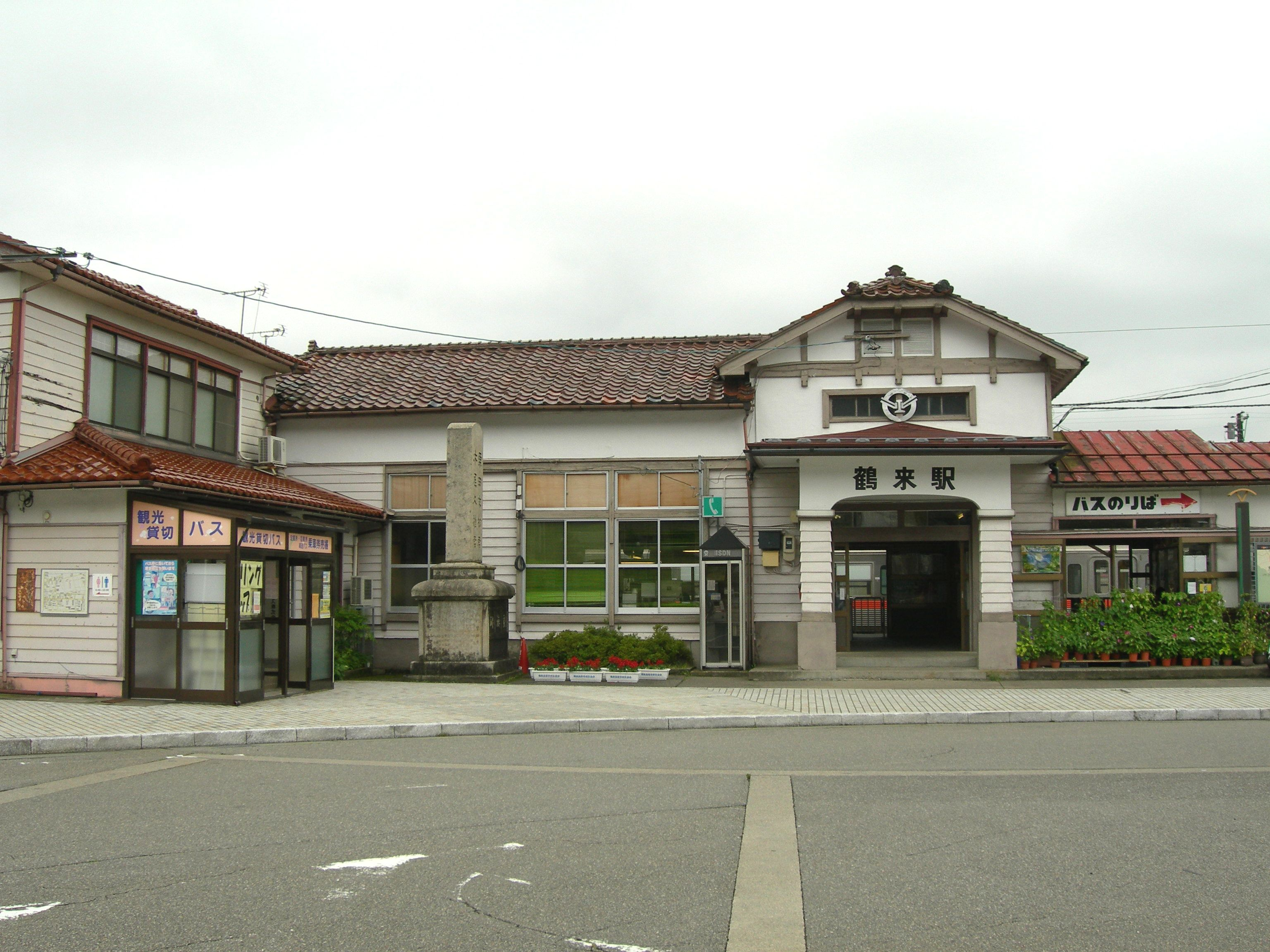 鶴来駅